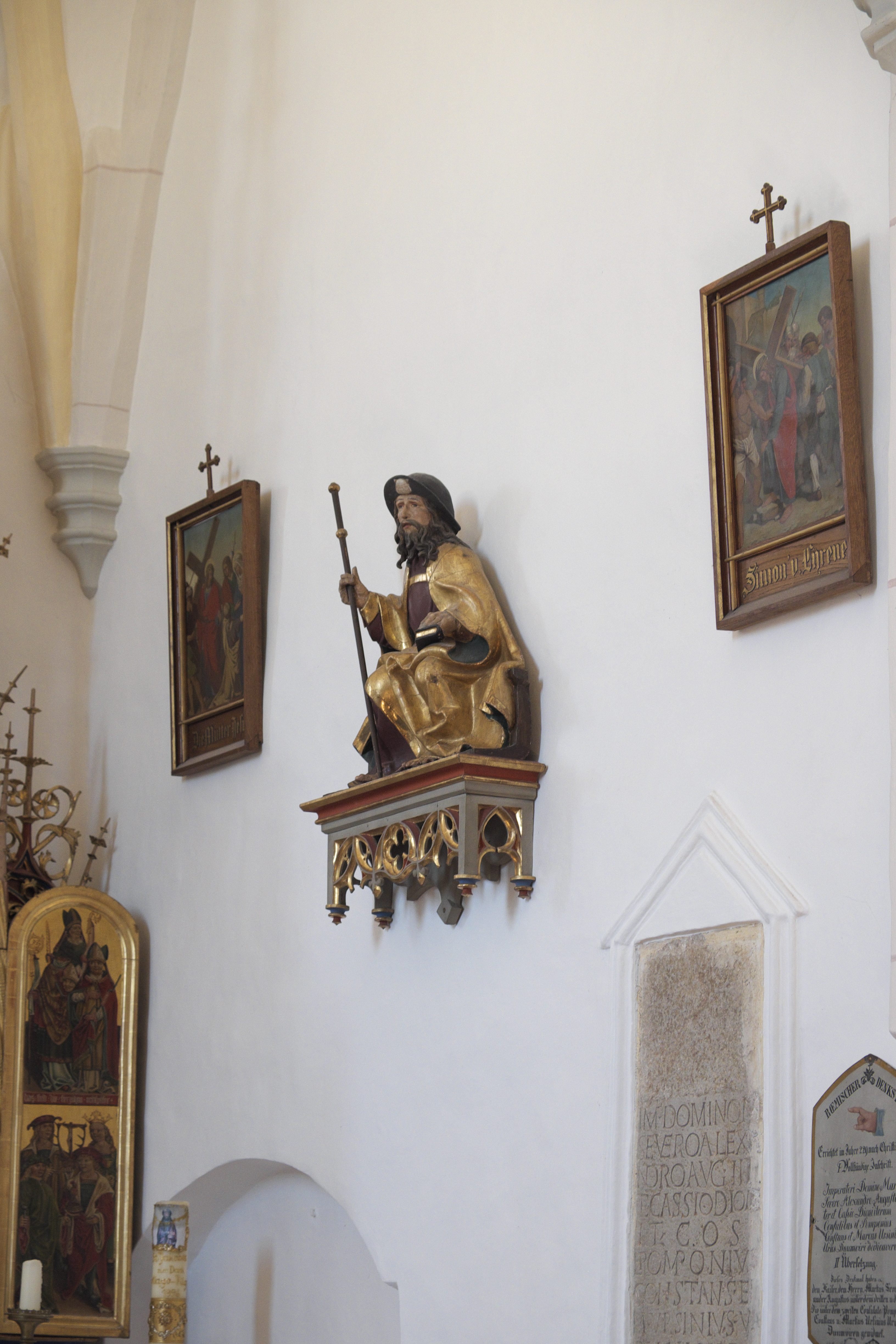 Katholische Filialkirche St. Jakobus der Ältere in Rabenden, einem Ortsteil von Altenmarkt an der Alz im Landkreis Traunstein (Bayern/Deutschland), Figur des Apostels Jakobus des Älteren, vermutlich aus der Werkstatt des Meisters von Rabenden